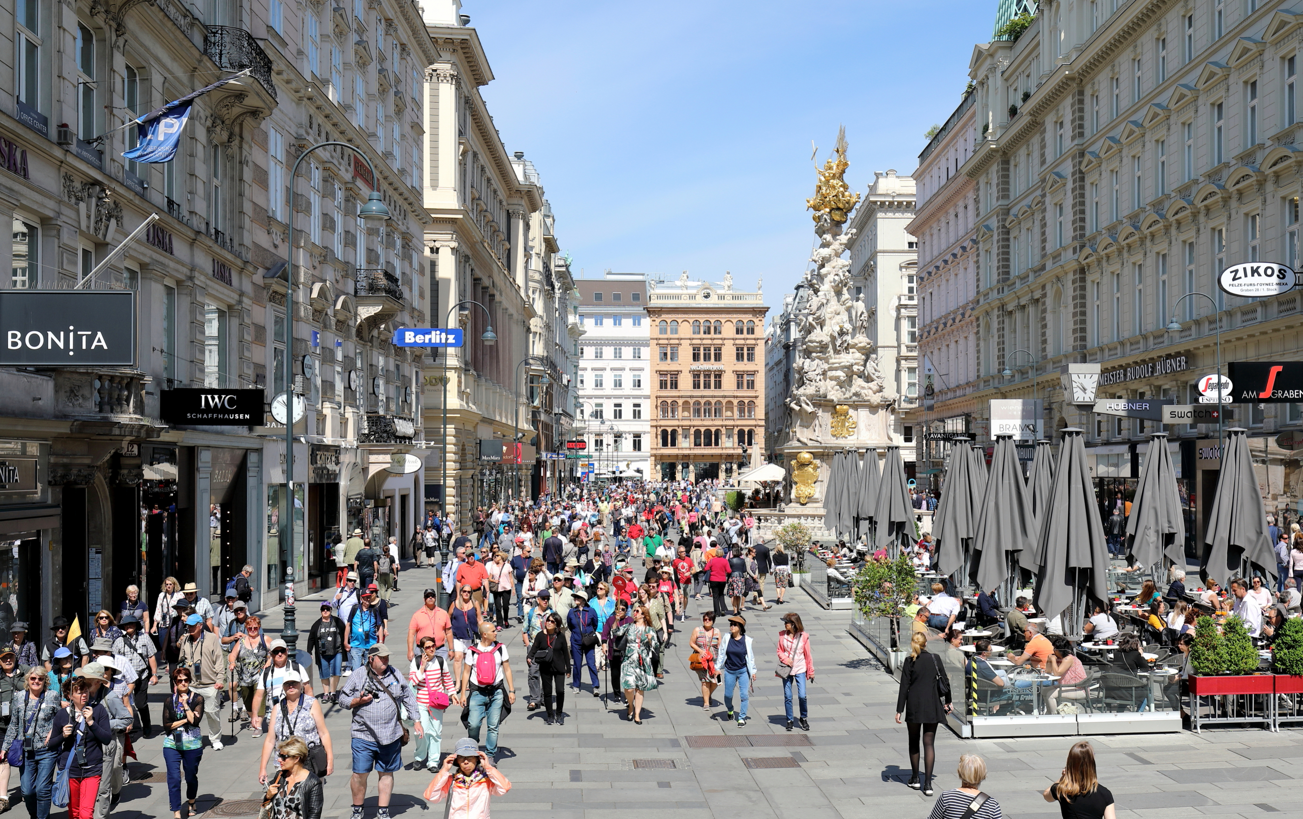 Die Prachtstrasse und jetzige Fußgängerzone Graben im 1. Wiener Gemeindebezirk Innere Stadt mit der 1679 gestifteten Dreifaltigkeitssäule (Pestsäule) im Zentrum. Der Graben wird 1294 erstmals urkundlich als Verkehrsfläche erwähnt und 1300 erstmals als Marktplatz bezeichnet. 1971 wurde erstmals in Wien an dem rund 250 Meter langen Straßenzug probeweise die Fußgängerzone eingeführt.